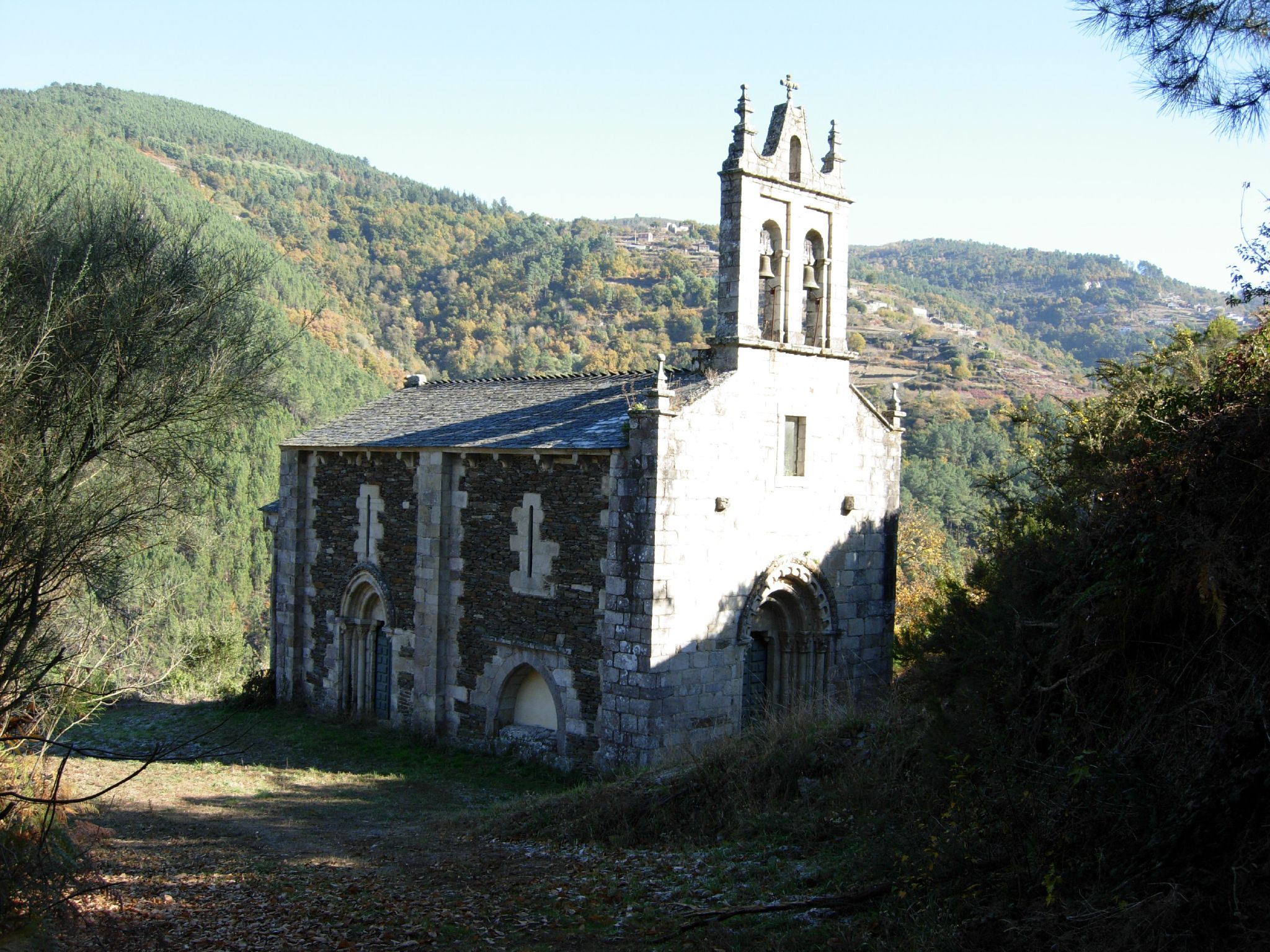 La iglesia actual fue trasladada de su anterior ubicación a una cota más alta para no quedar sepultada por las aguas del embalse de Os Peares.